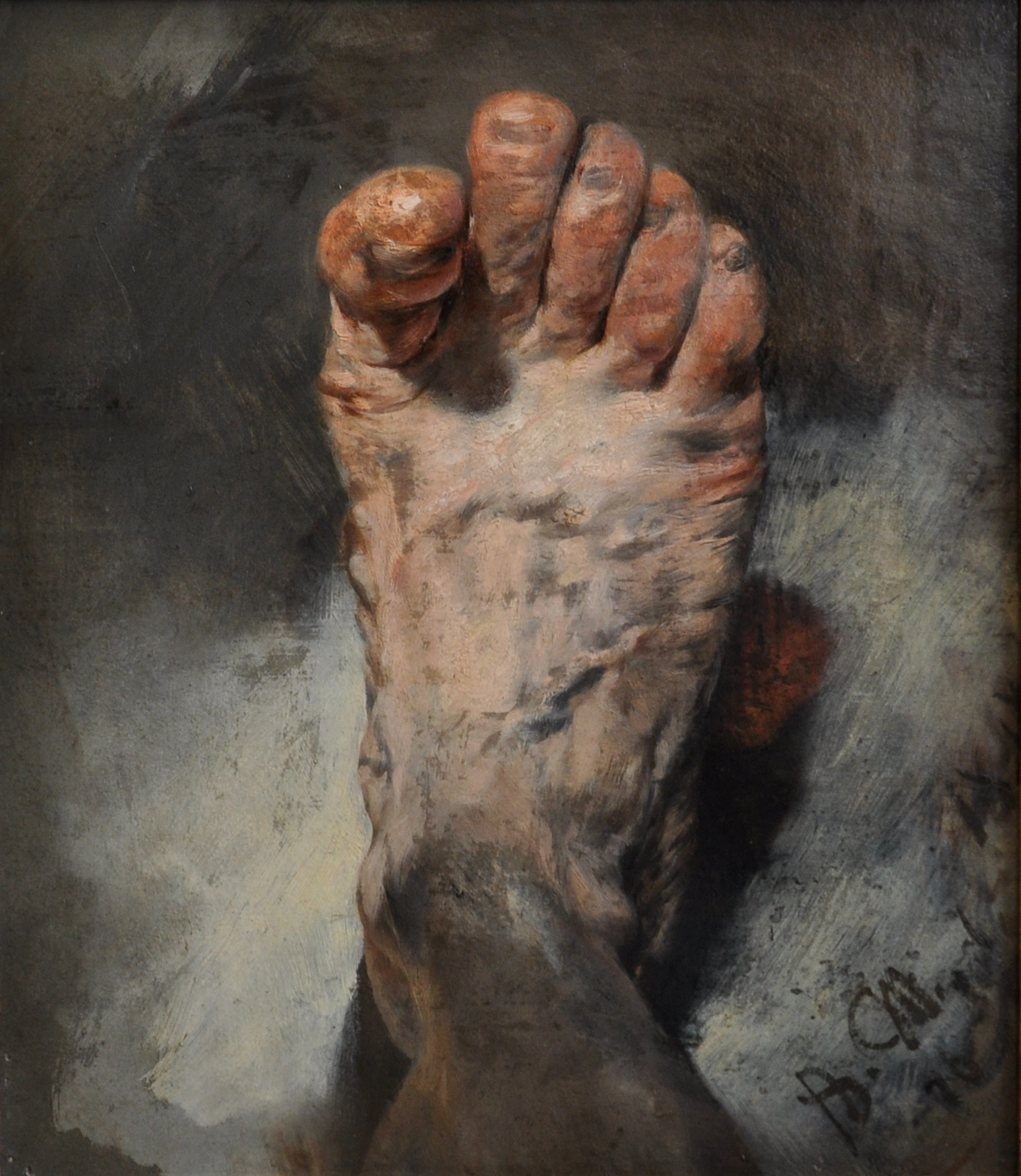 Der Fuß des Künstlers; Öl auf Holz; Eigentum des Vereins der Freunde der Nationalgalerie